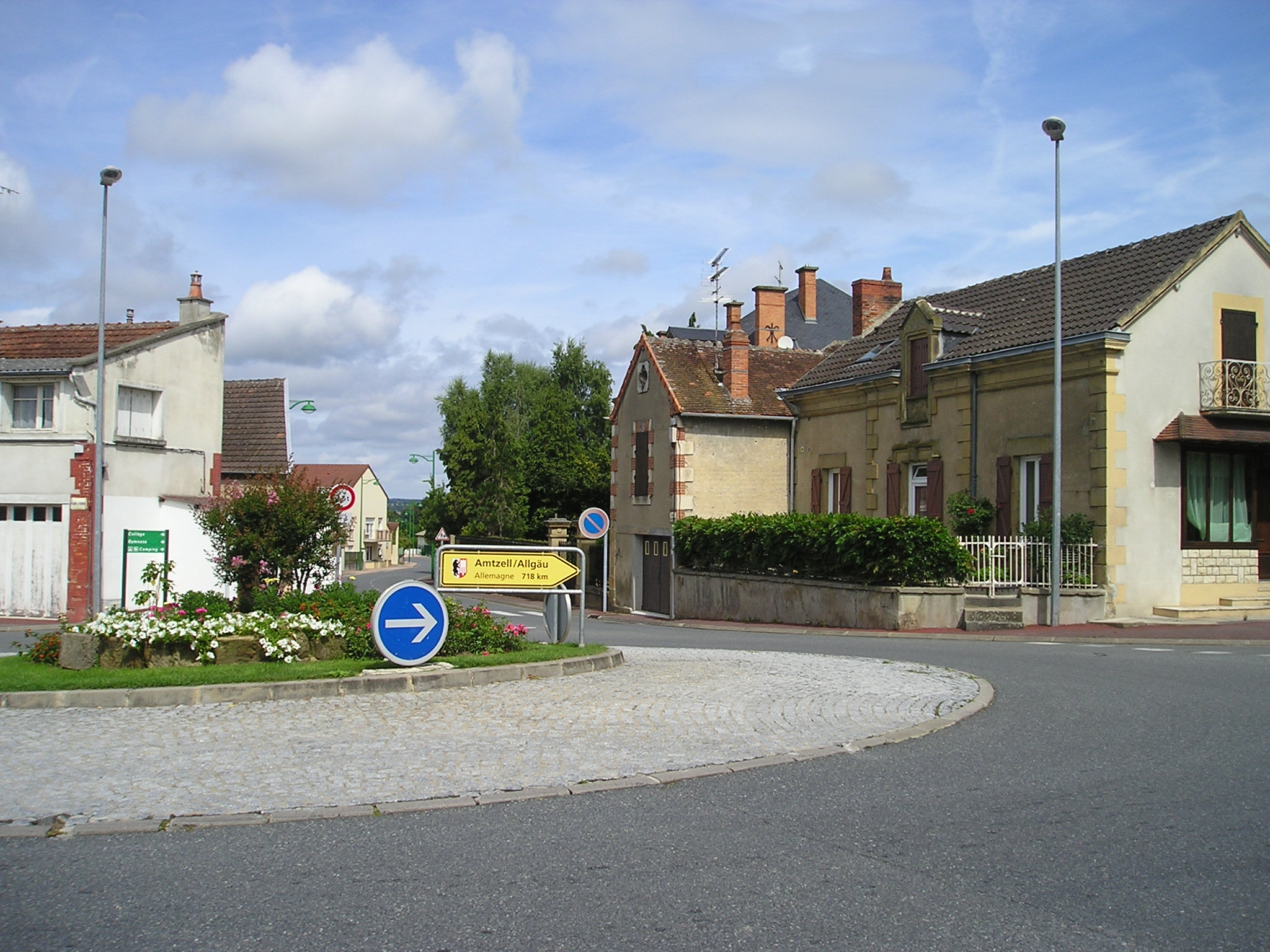 Cosne_d'Allier,_Schild_mit_Hinweis_auf_Amtzell_im_Allgäu